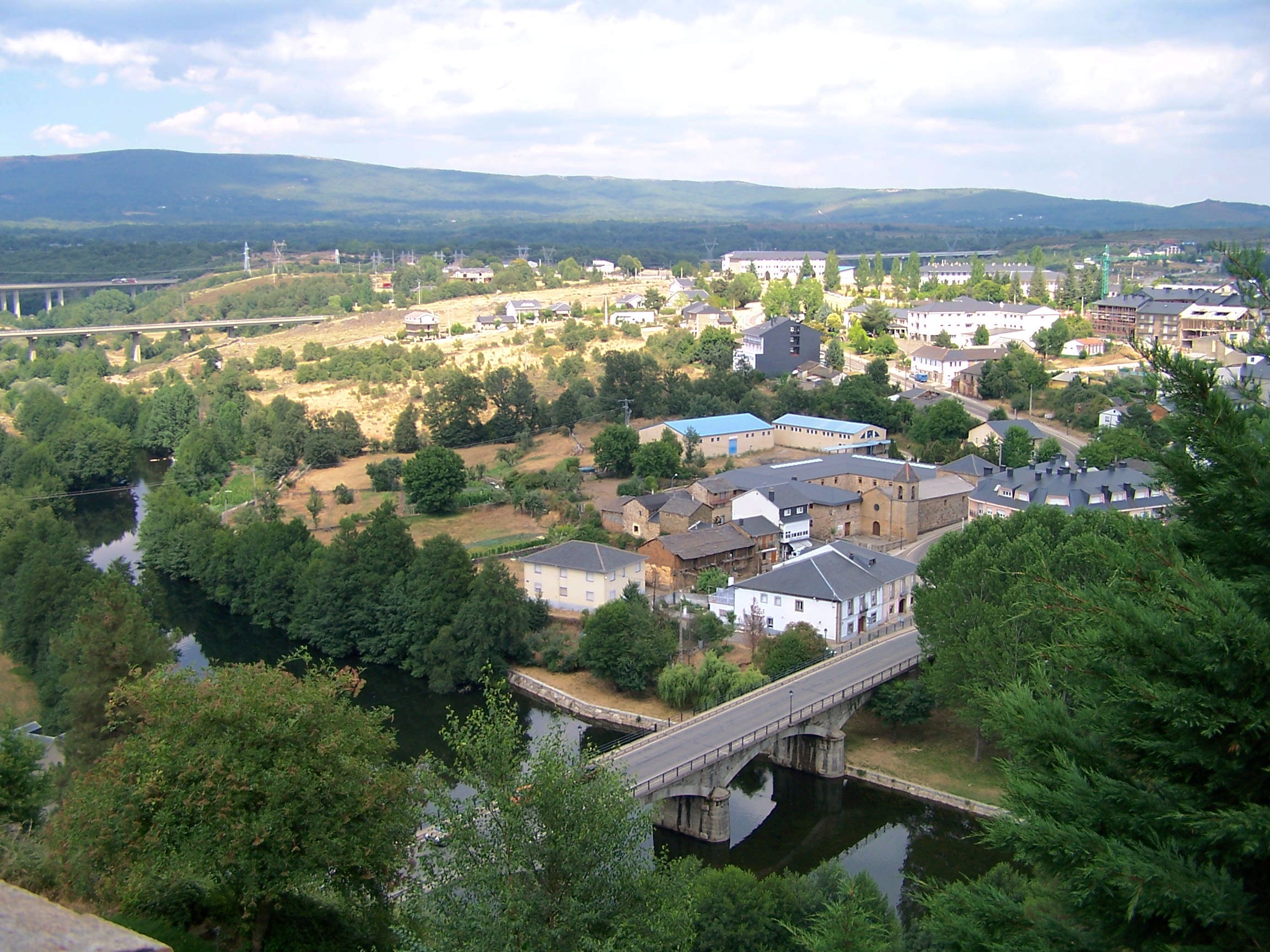 Es el skyline de Puebla de Sanabria desde el castilo, donde se emiten pelis. Al fondo está la A-52.